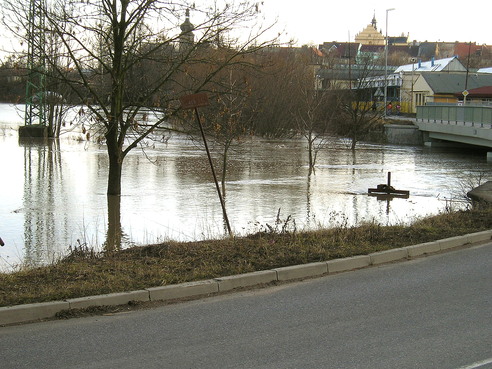 Řeka Loučná při povodních v roce 2005 na okraji Vysokého Mýta